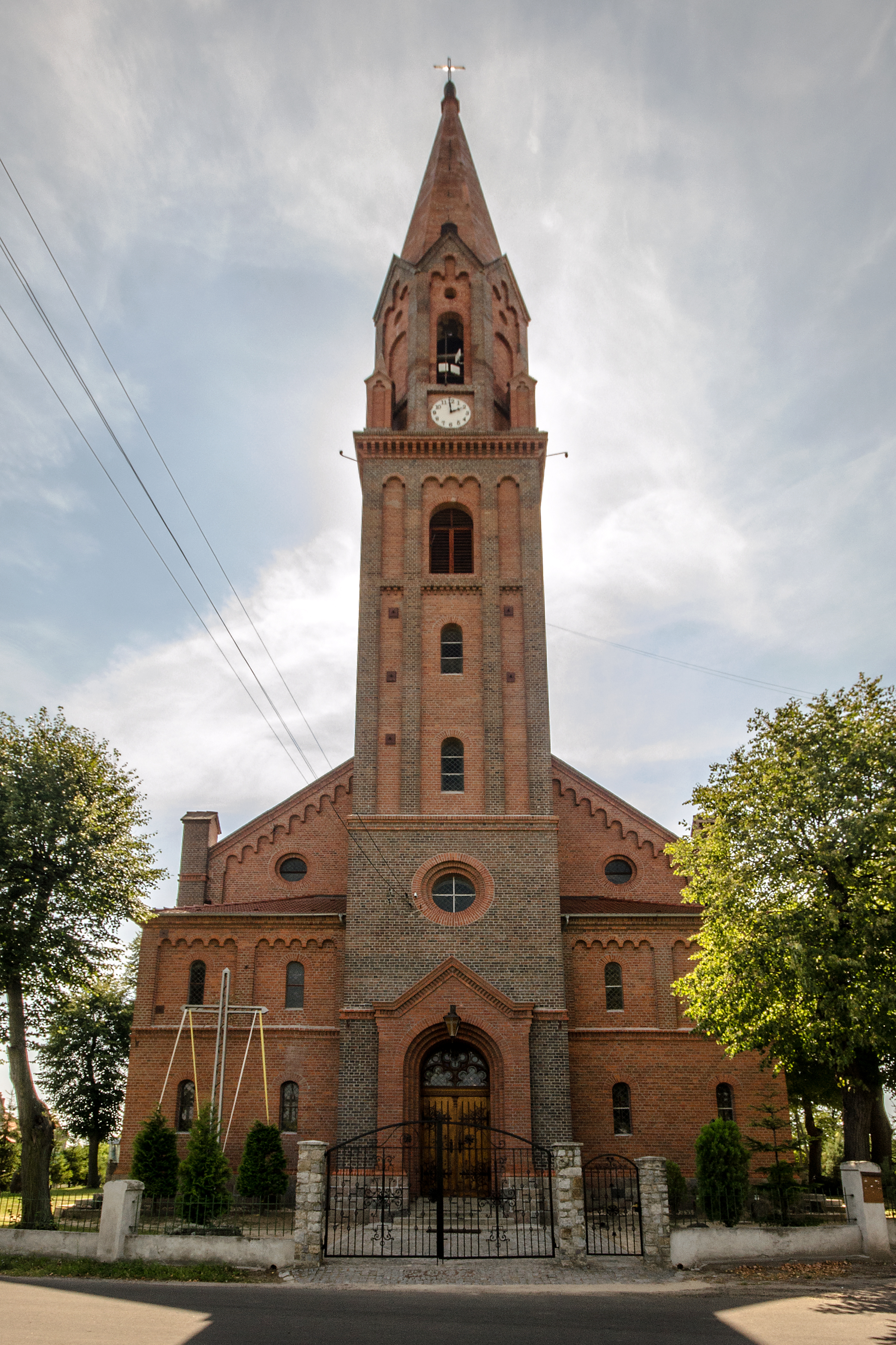 Strupina, ul. Rynek - dawny kościół ewangelicki, obecnie rzymskokatolicki parafialny p.w. Niepokalanego Serca NMP NMP, 1879-1881